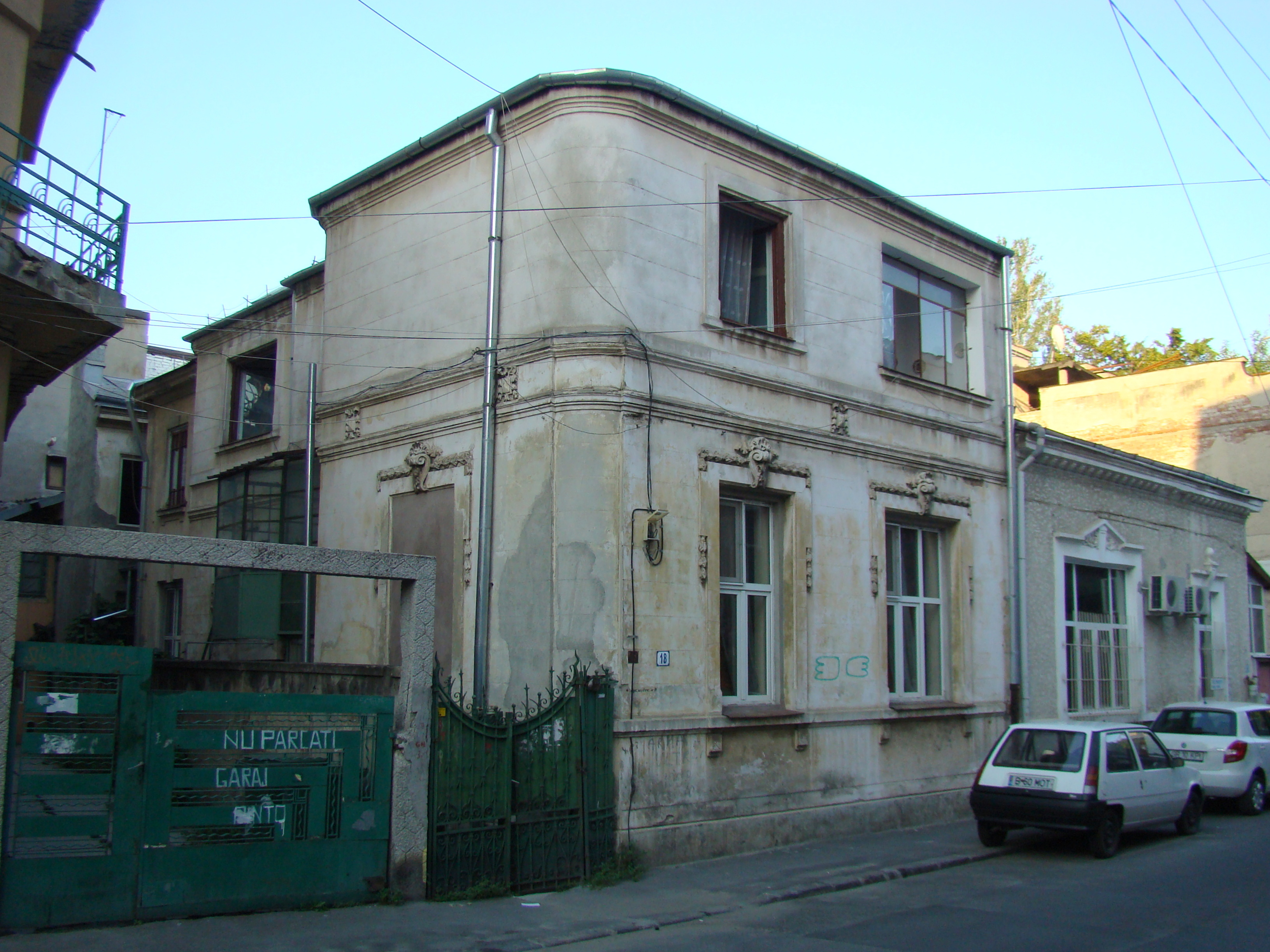 Casă monument istoric, str. Theodor Aman, nr.18